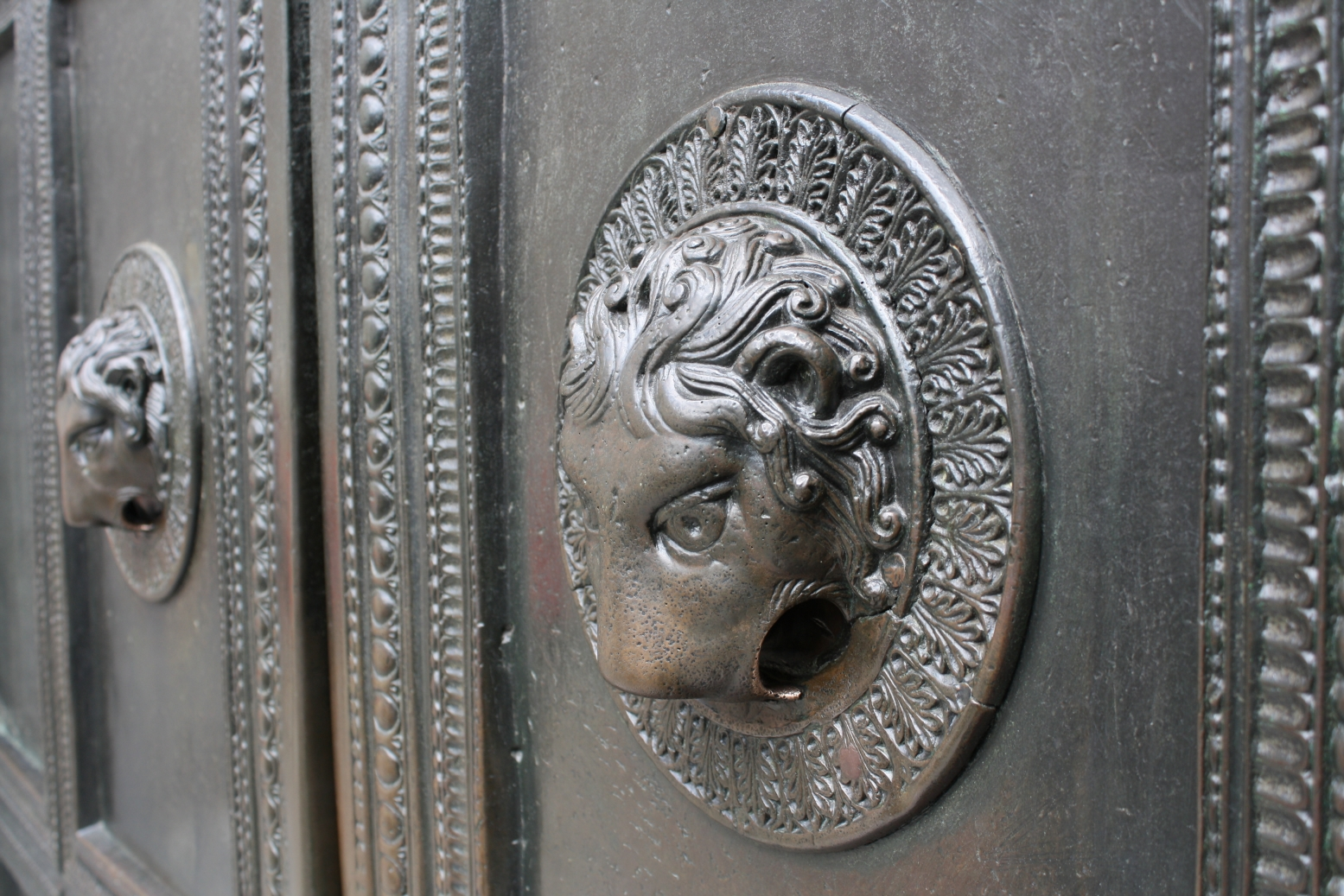 Löwenkopf-Türgriff am Bronzeportal des Aachener Doms